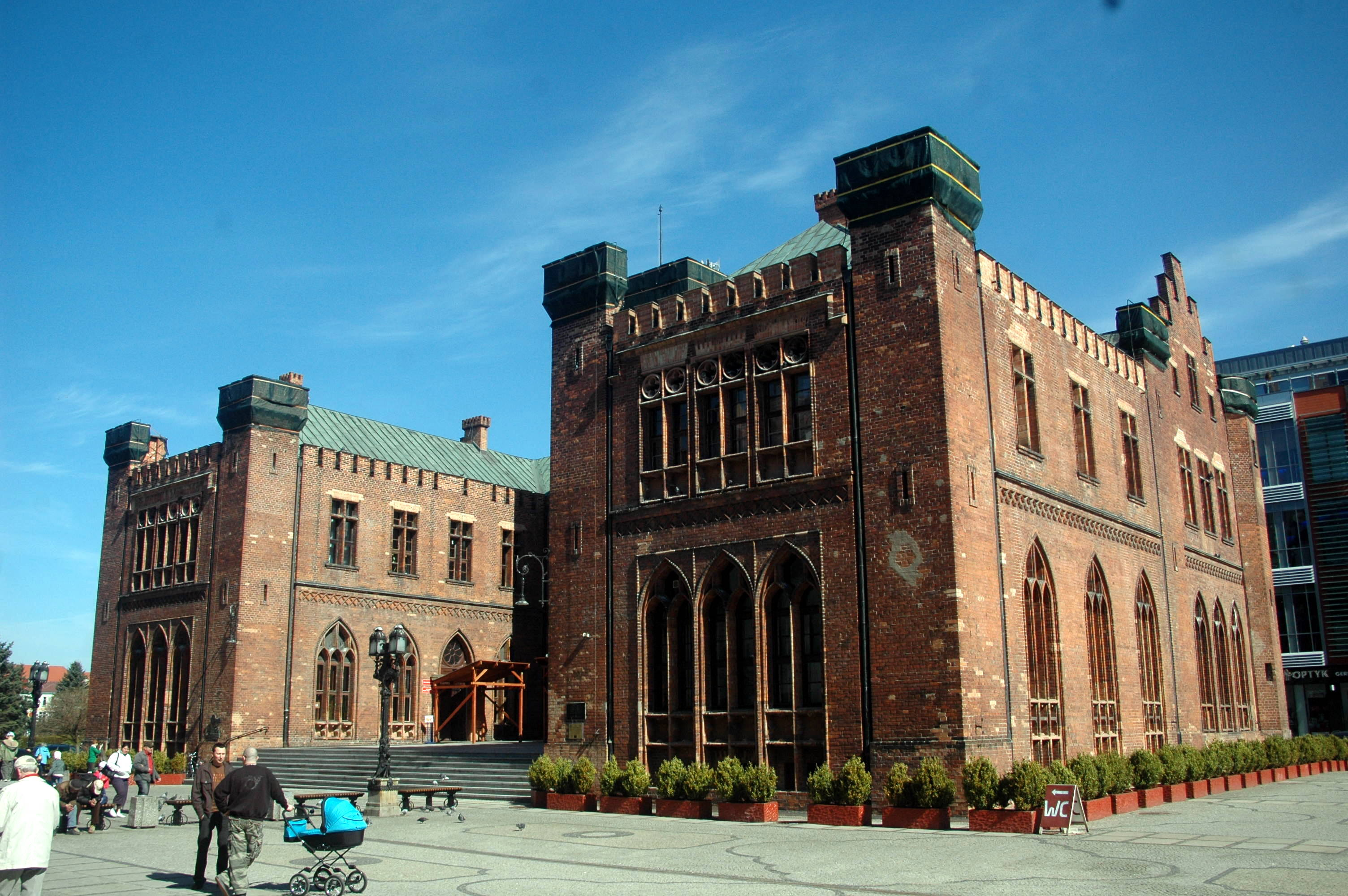 Ratusz na placu Ratuszowym w Kołobrzegu.